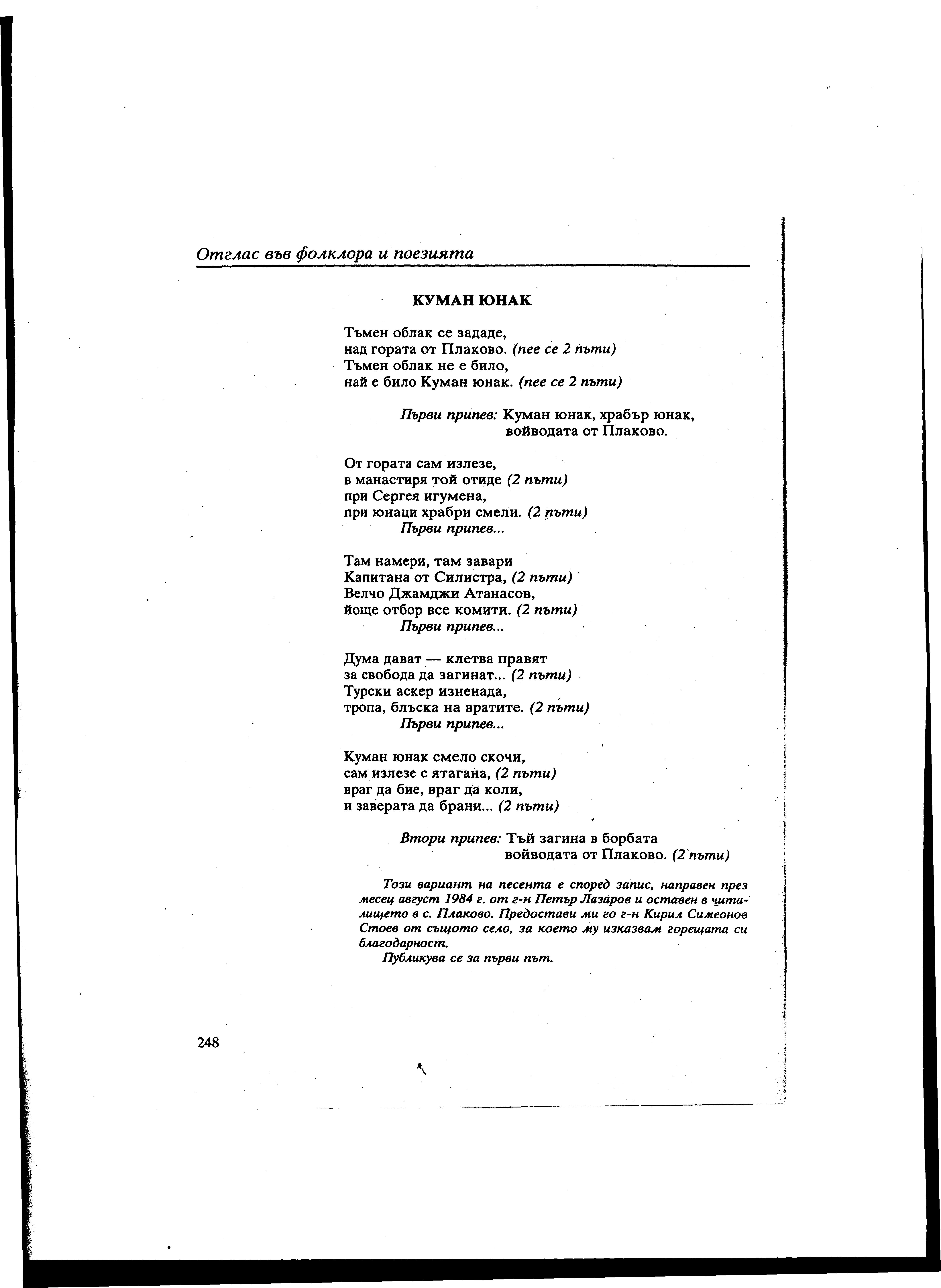 Песен за Куман Войвода.